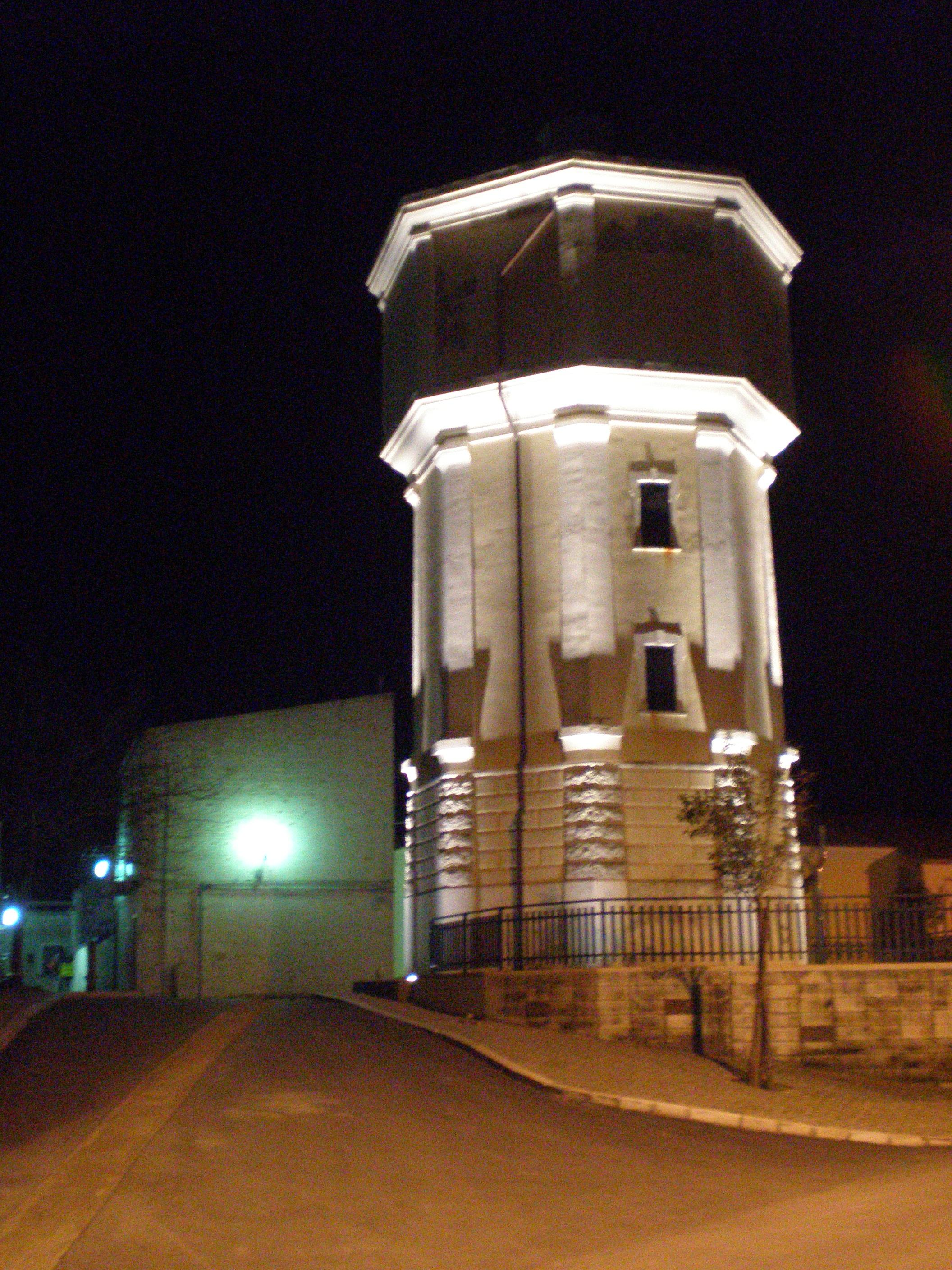 Castelluccio dei Sauri, Serbatoio Acquedotto Pugliese